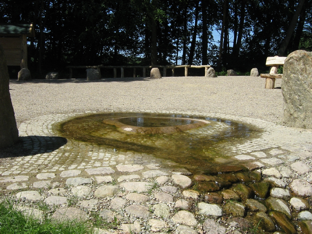 Mühlensee die eingefasste (scheinbare) Havelquelle in der Mecklenburgischen Seenplatte (Landkreis Müritz, Mecklenburg-Vorpommern, Germany). Diese Quelle wird aus unterirdisch durchdrückendem Wasser des Mühlensees bei Ankershagen gespeist.